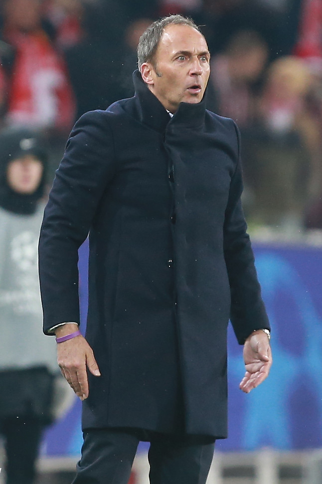 «Спартак» остается в еврокубках